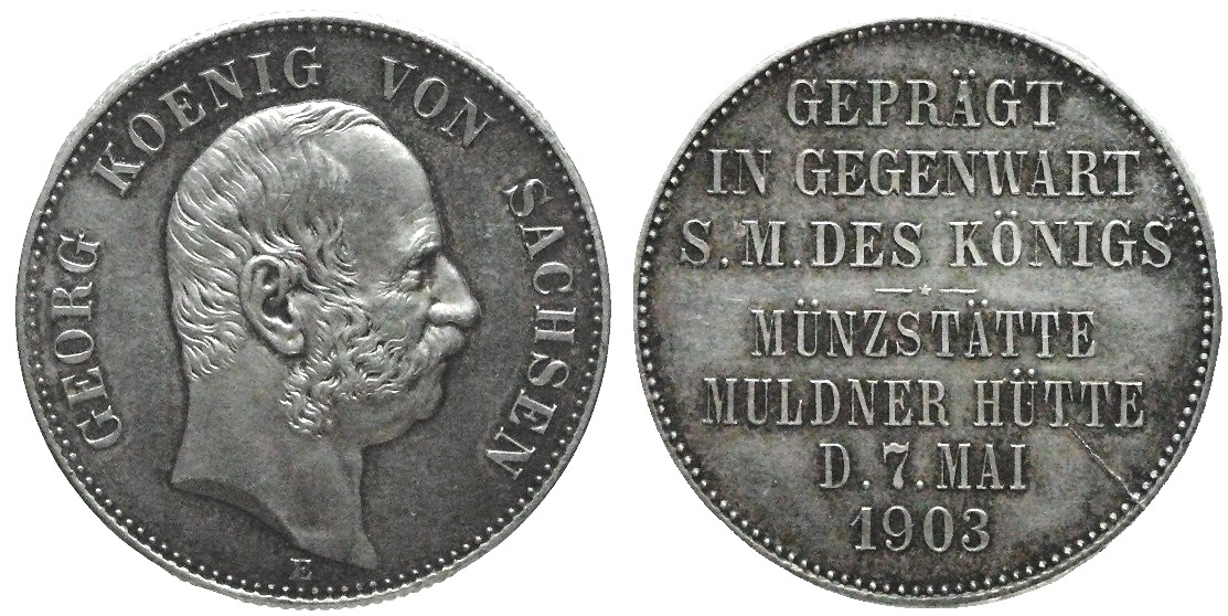 Georg König von Sachsen 1903 Münzbesuchsmünze Stempelglanz Auflage 1.004 Stück Münze wie 2-Mark-Reichsmünze im 100-Mark-Münzfuß, Silber Ag 900 Feinsilbergewicht: 10,00 g Rauhgewicht: 11,11 g Durchmesser: 28 mm